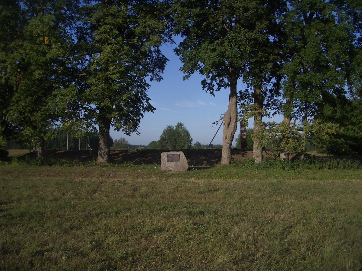 Sipe kooli mälestuskivi. Varemalt olid selle kivi taga koolimaja varemed. Praeguseks on alles korsten ja selline omapärane majasuurune poole meetri kõrgune hauaküngas.